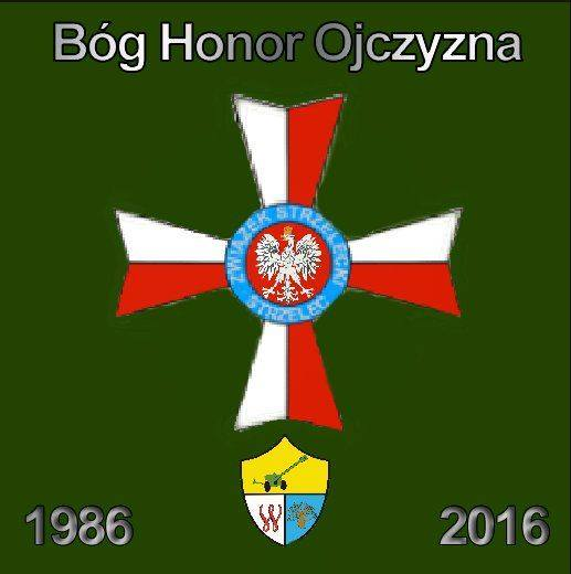 awers